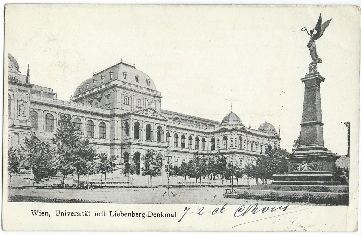 Vue de Vienne au début du XXe siècle.